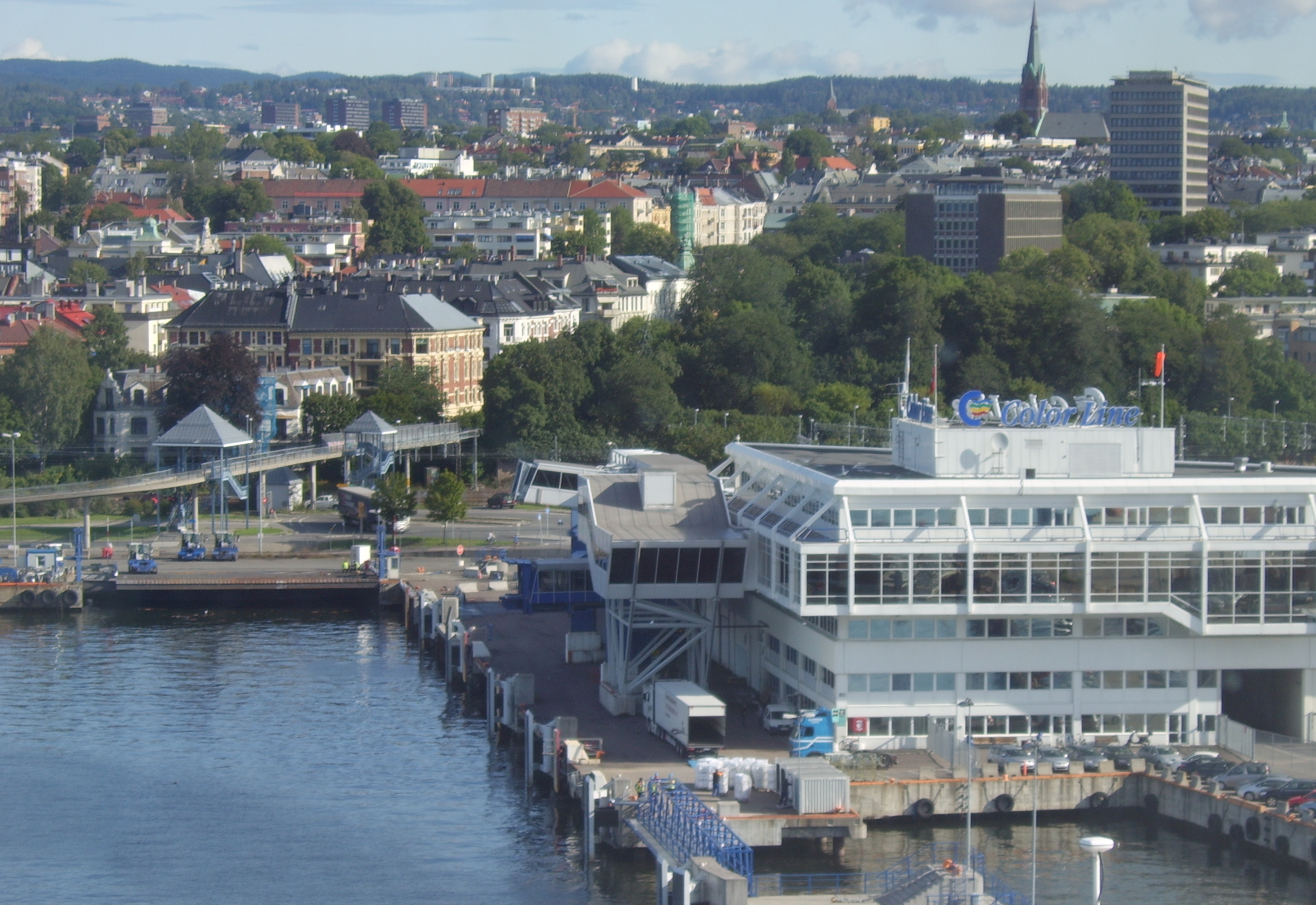 Oslo, Norway